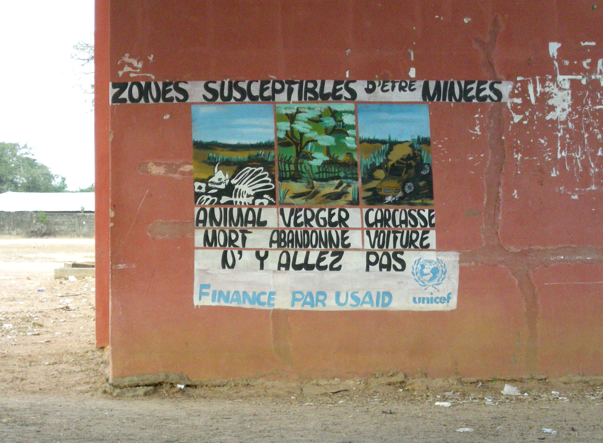 Mise en garde des élèves contre les mines anti-personnel sur le mur du CEM Aline Sitoé Diatta à Oussouye (Casamance, Sénégal)